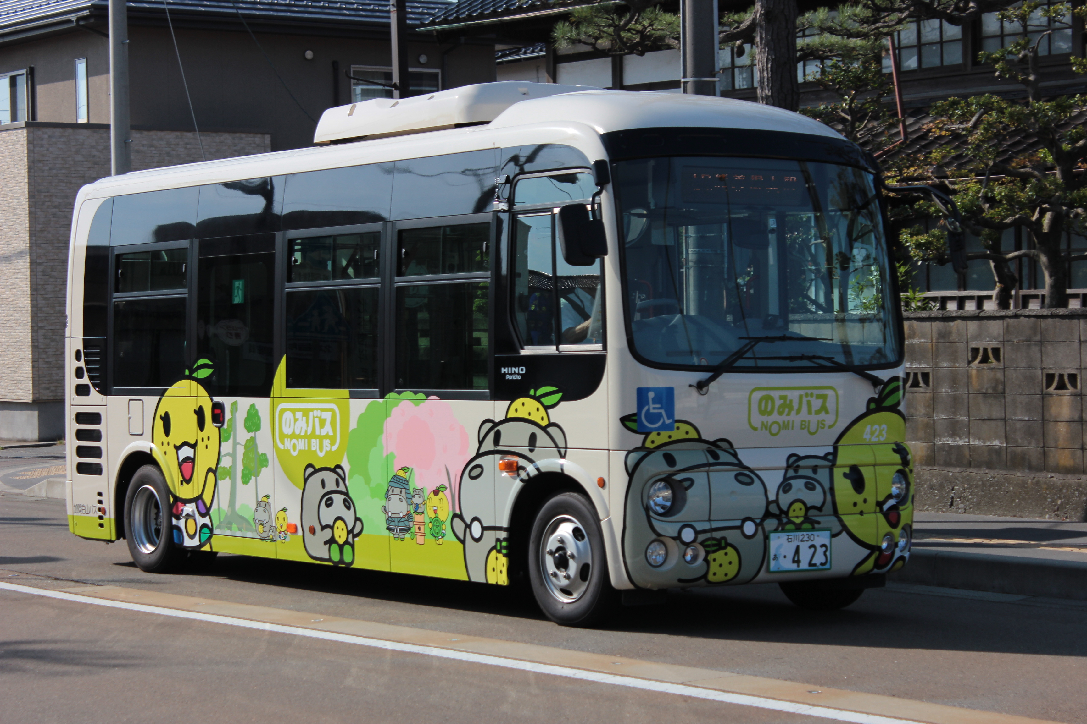 加賀白山バスののみバス（日野・ポンチョ、2DG-HX9JLCE）、車体には能美市のマスコットが描かれている。 Canon EOS Kiss X5